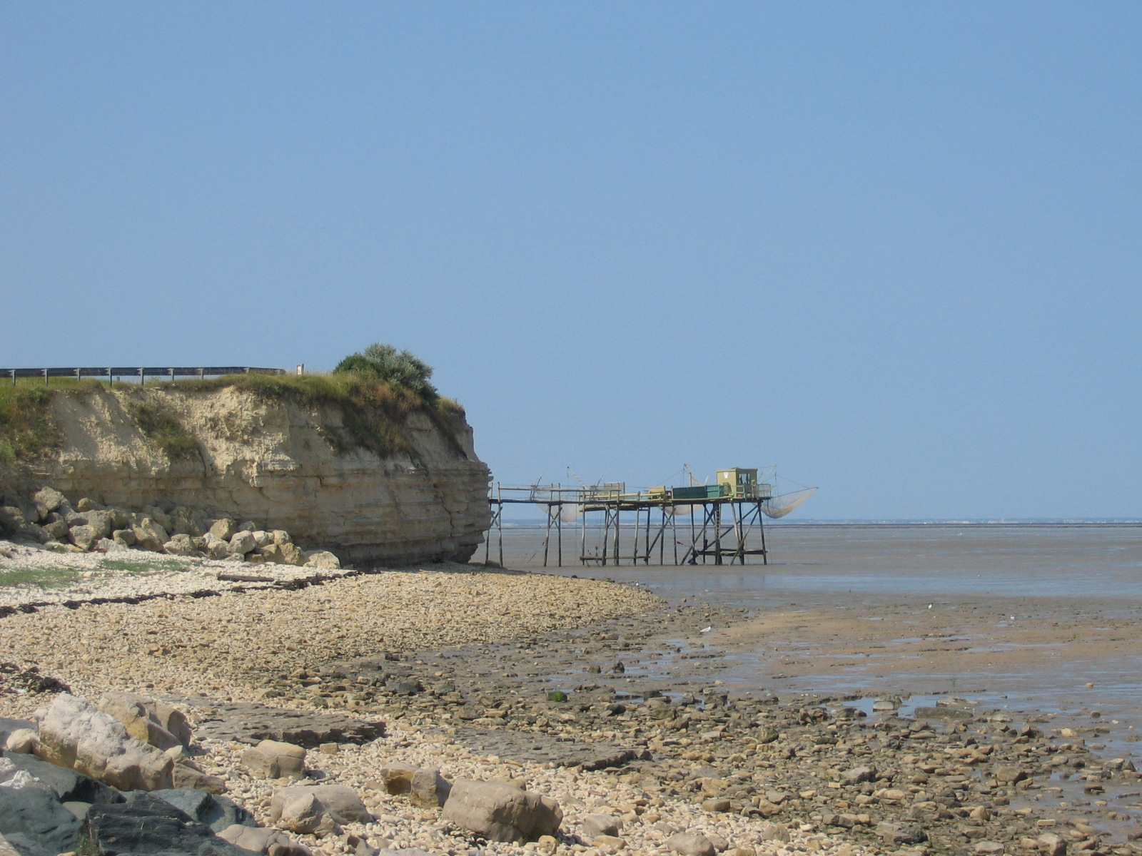 Cabane traditionelle de pêcheur à la pointe Saint-Clément en Charente-Maritime.